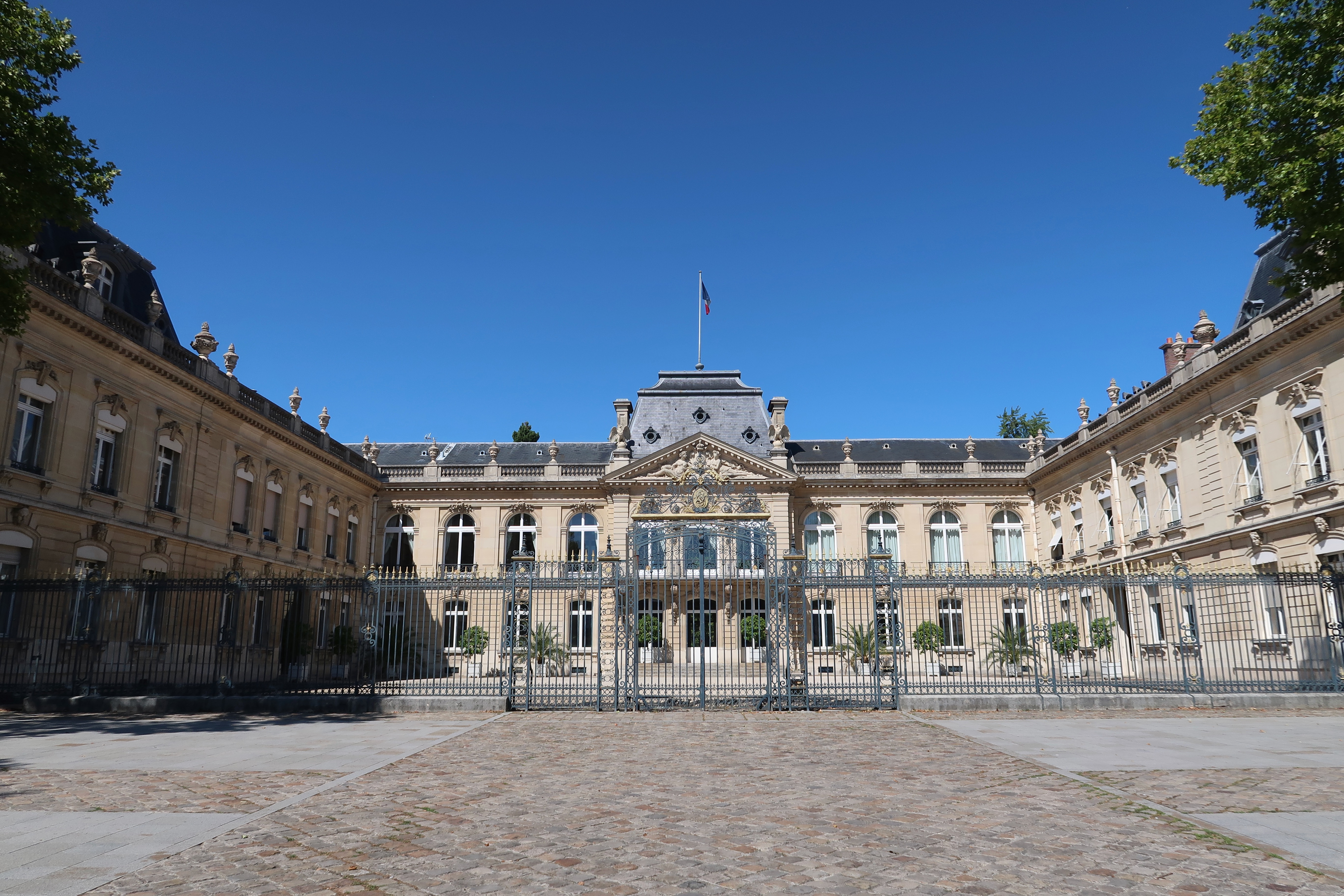 Hôtel de préfecture des Yvelines, avenue de Paris à Versailles (Yvelines).